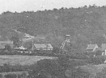 Le puits de Ressille des Houillères d’Épinac.